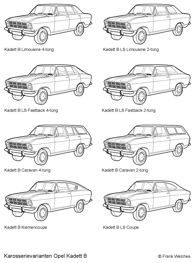 Karosserievarianten Opel Kadett B, Autor: F. Welches